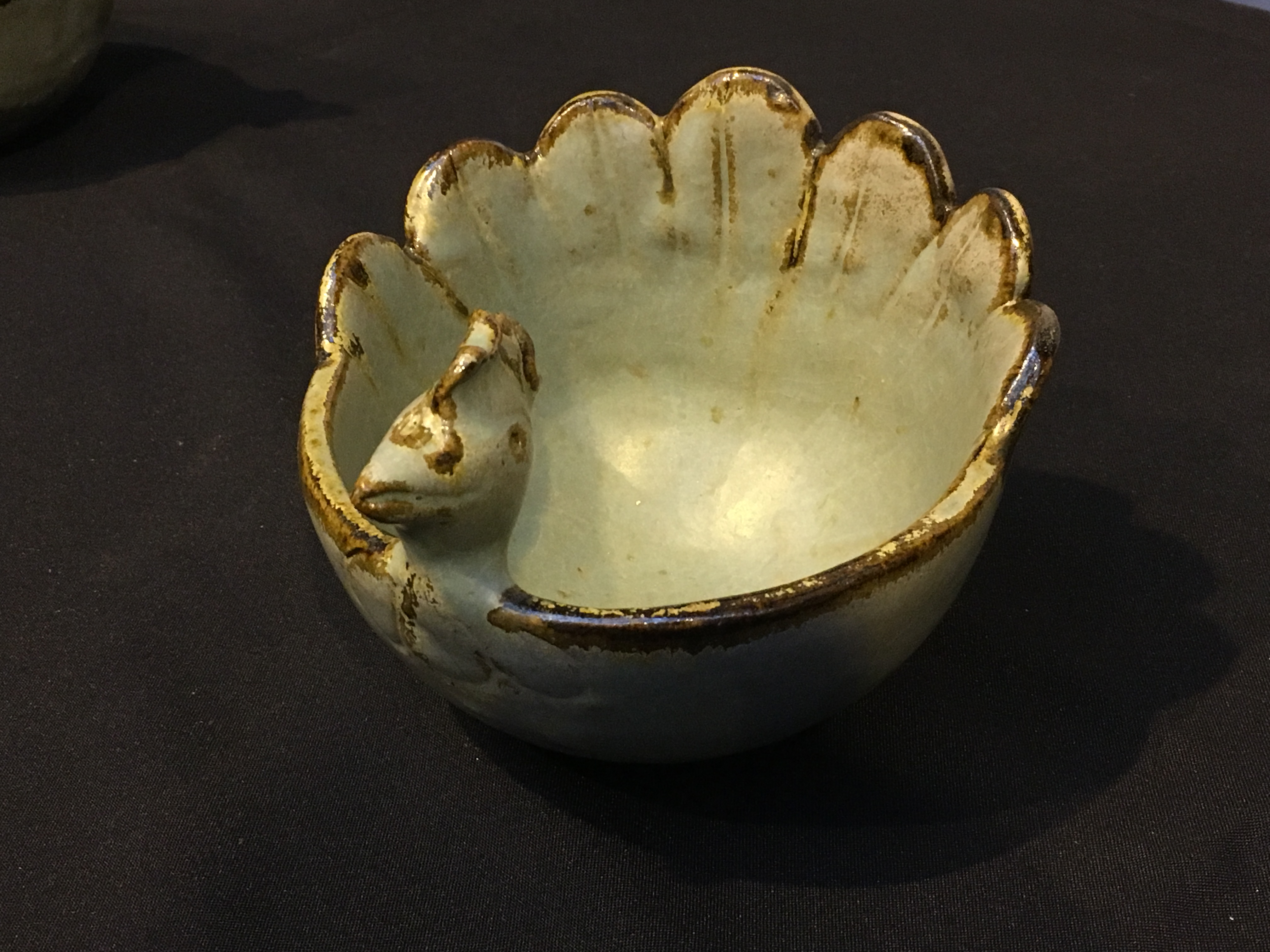 Cerámica de la localidad de Guangualí, Región de Coquimbo. Cerámica Gres color verde representan figuras de animales (pavos, gallinas, cabras, etc.)